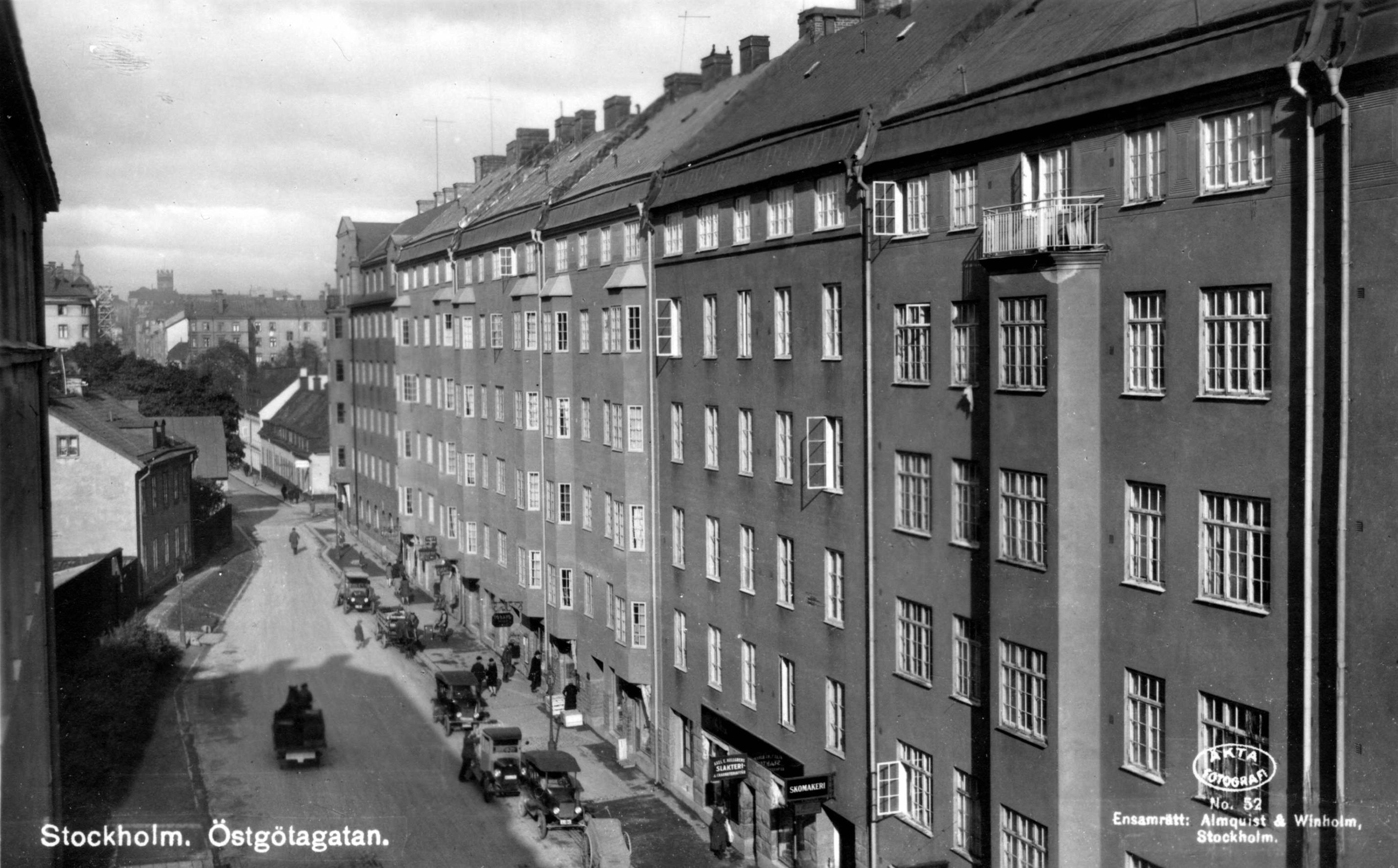 Östgötagatan vid korsningen Gotlandsgatan